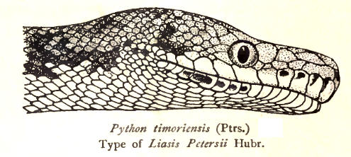 Python timoriensis